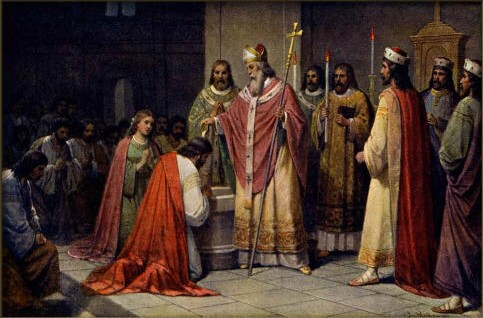 Česky: Josef Mathauser - Arcibiskup Metoděj křtí českého knížete Bořivoje a jeho manželku Ludmilu